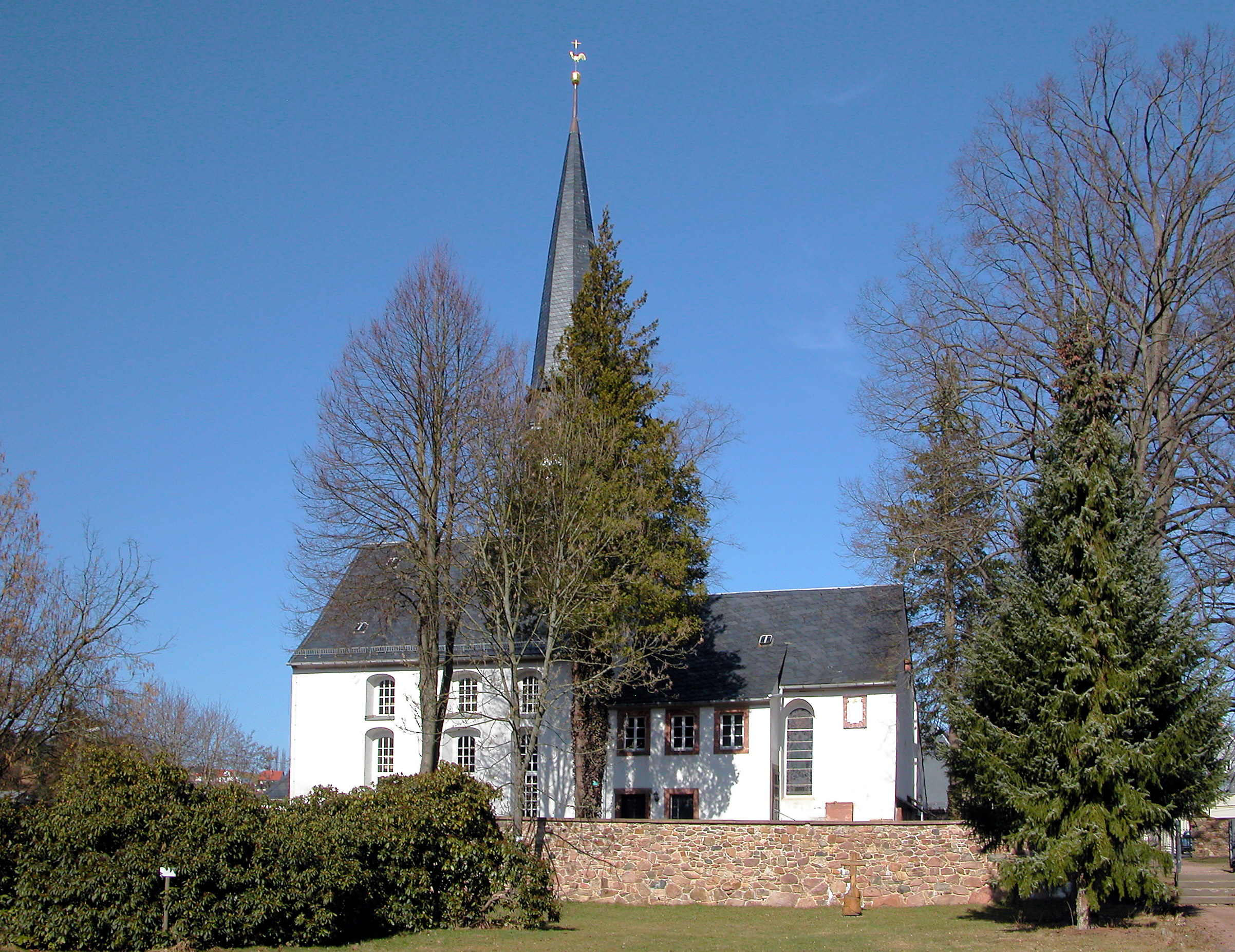 16.03.2012 09648 Ringethal (Mittweida), Hauptstraße (GMP: 51.005597,12.99918): In der Dorfkirche Ringethal befindet sich die wohl kleinste noch erhaltene Silbermann-Orgel mit 6 Registern und 379 Pfeifen. [DSCNn3215.TIF]20120316270DR.JPG(c)Blobelt